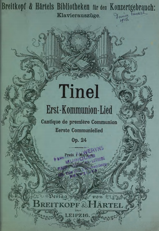 Edgar Tinel